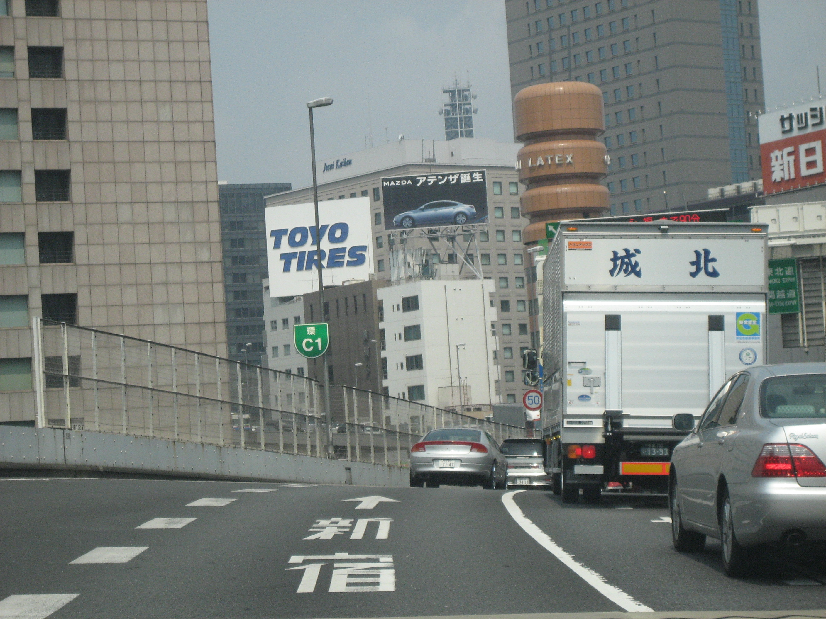 首都高速都心環状線神田橋付近